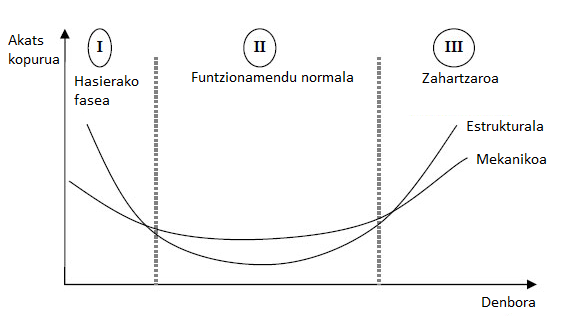 Bainuontzi-kurbaren hiru faseak.